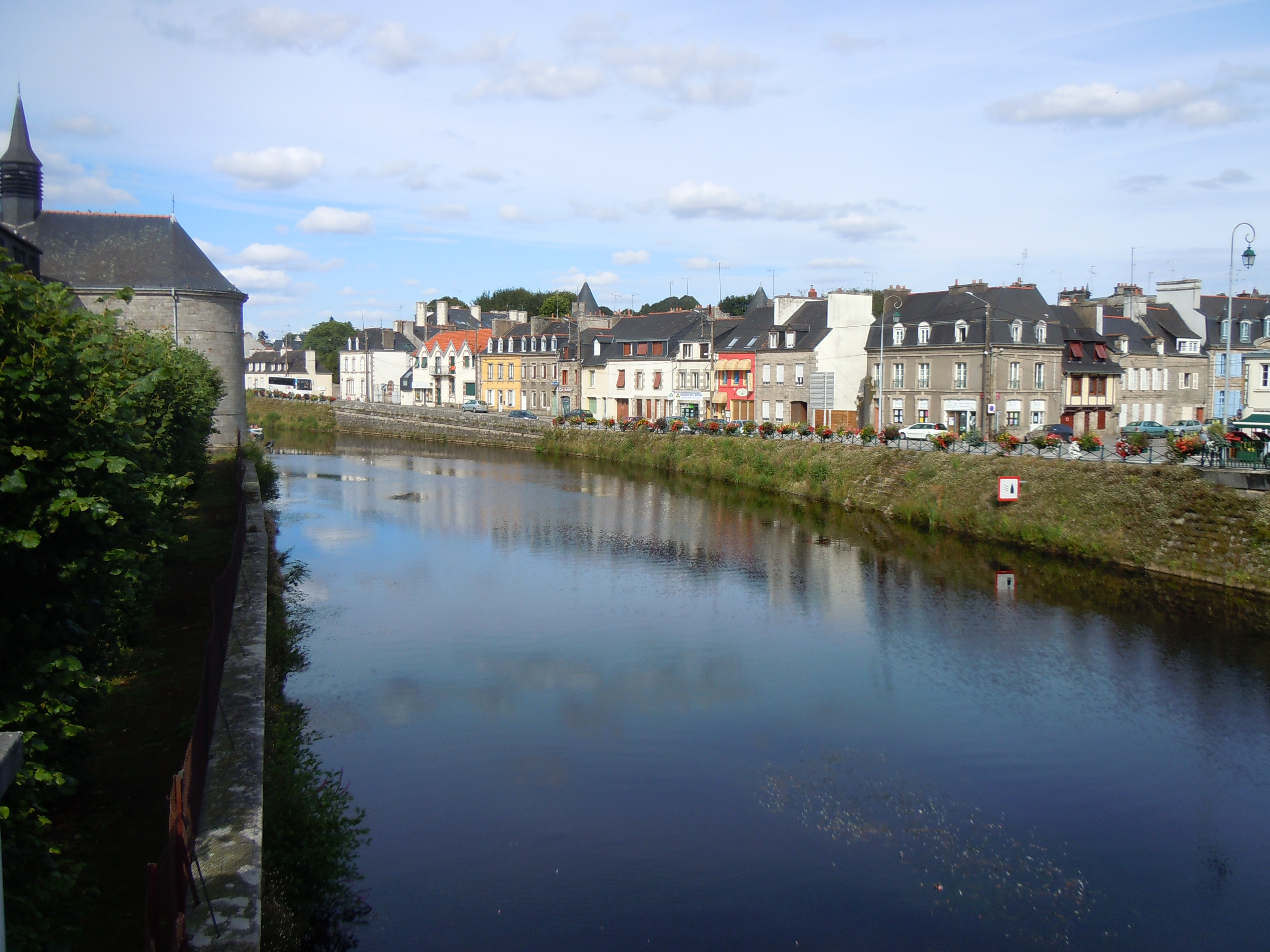 La Blavet canalisé dans la ville de Pontivy (département du Morbihan, Bretagne, France)